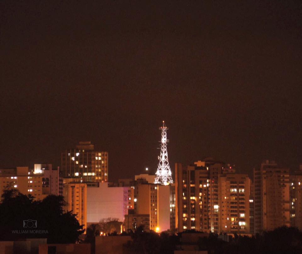 Centro de Uberlândia, visto do Uberlândia Shopping, na zona sul.